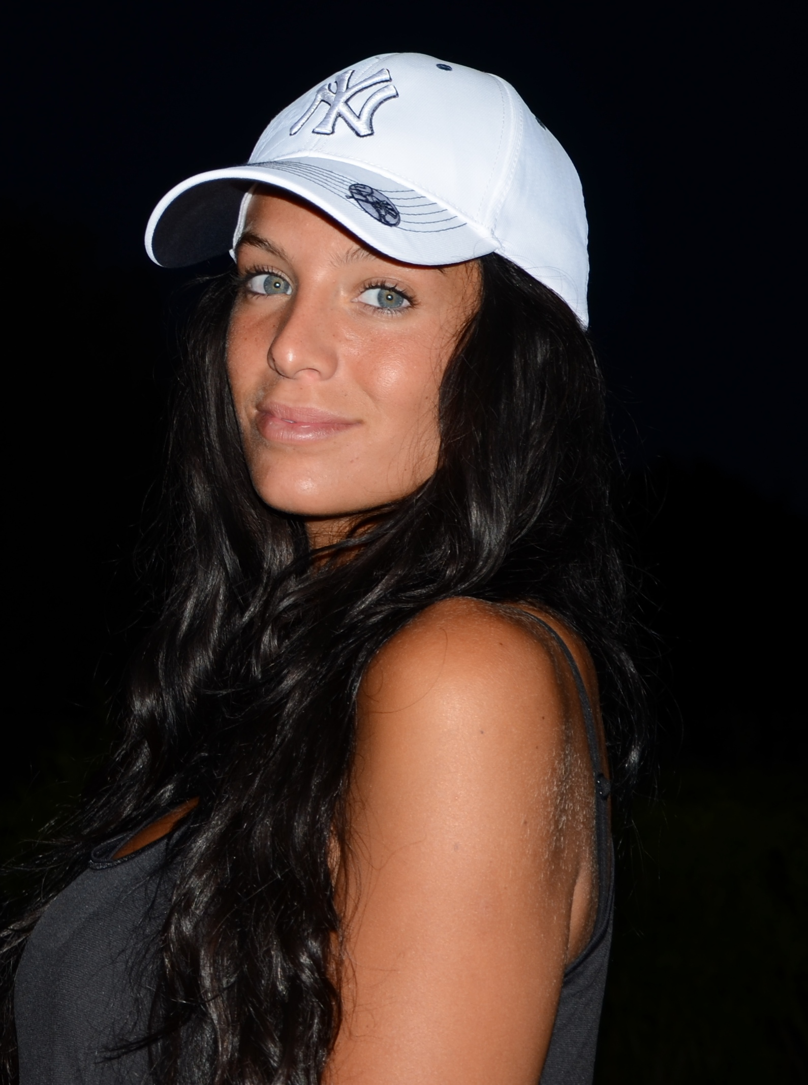 Une photo de Jade Foret lors de ses vacances aux USA en juillet 2011